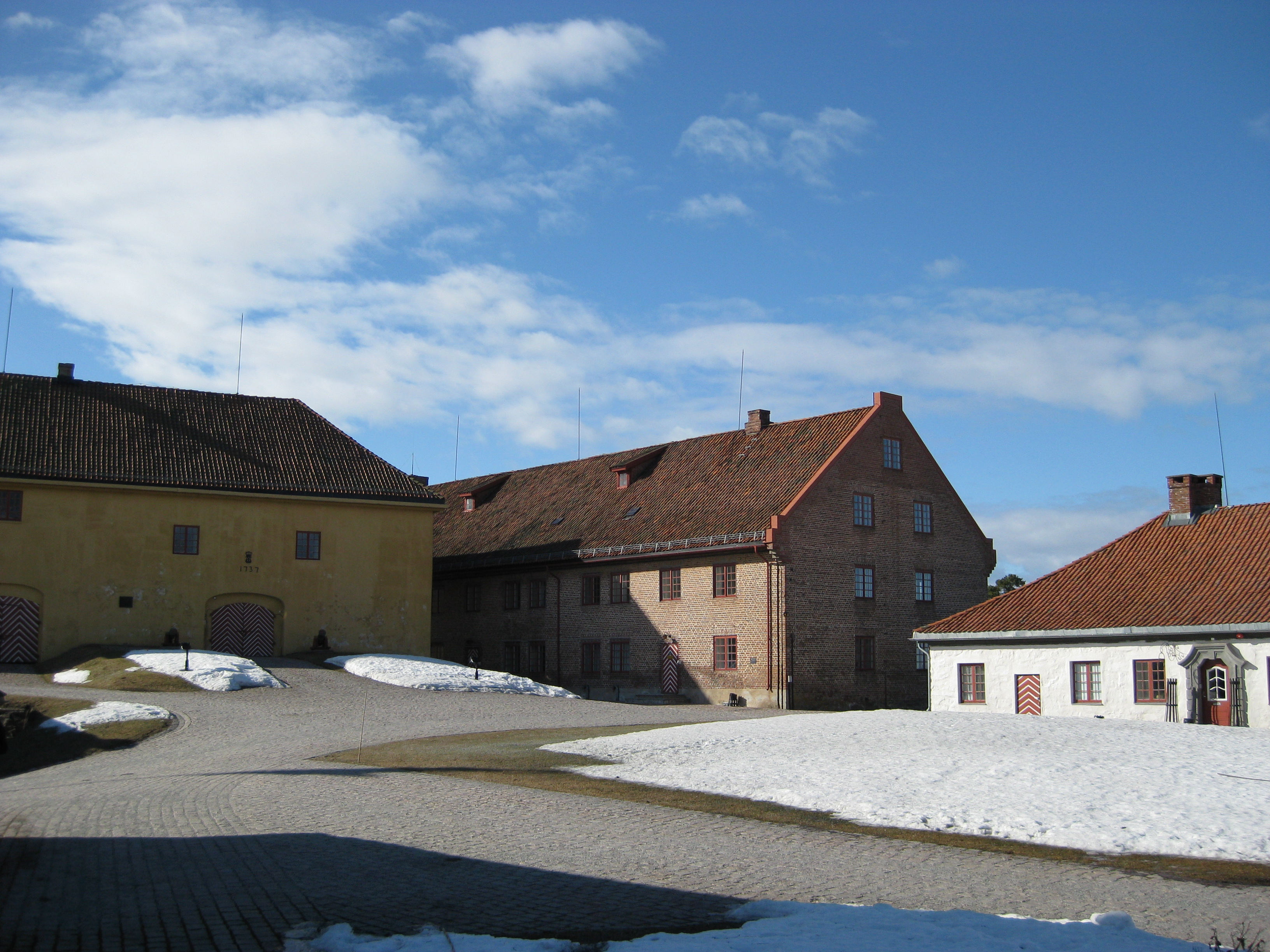 Kongsvinger festning. Fra venstre: Arsenalet (1737), Den nye Barakke (1788) og Den gamle Barakke (1702).